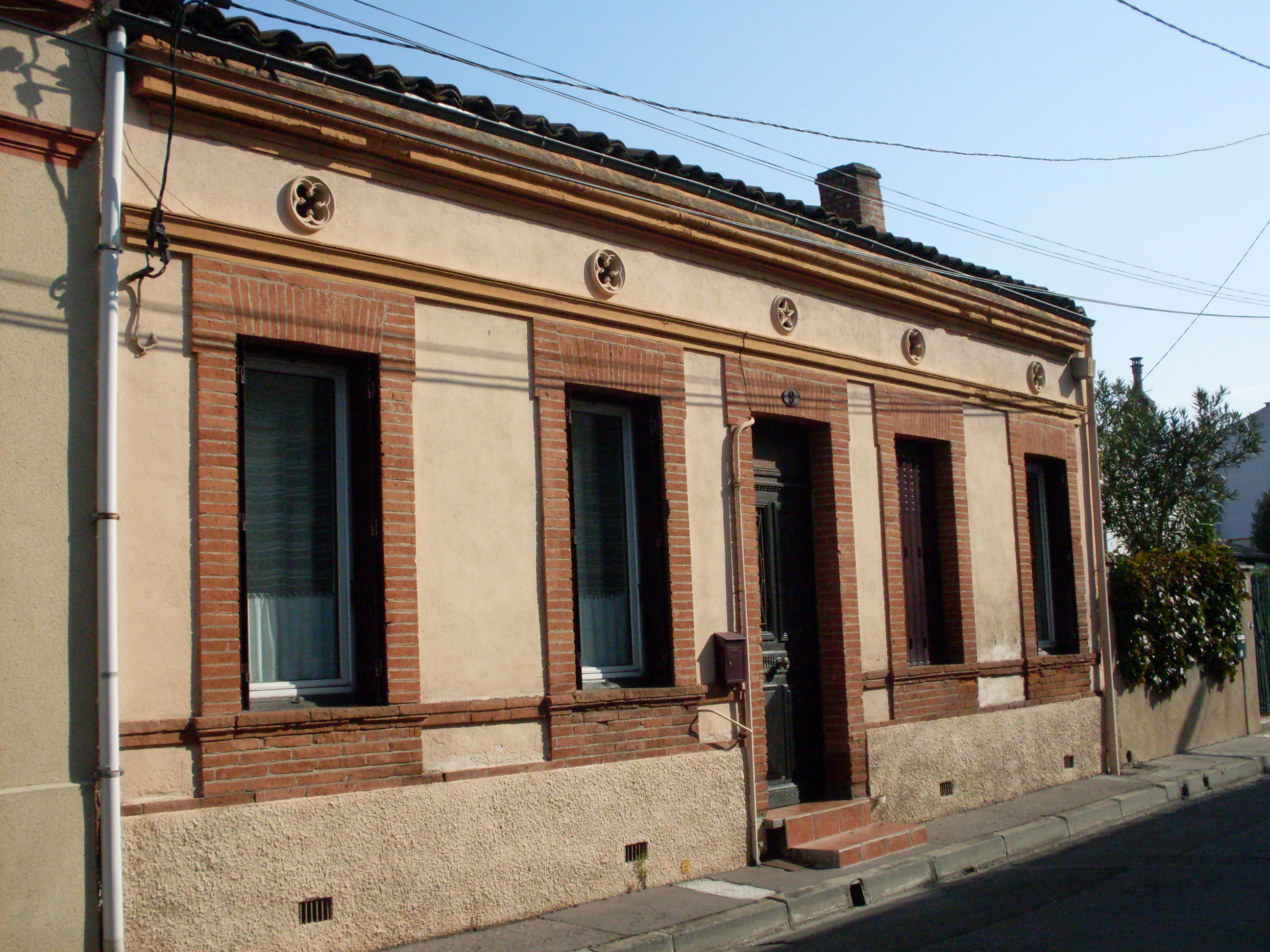 Toulousaine typique dans la rue Mengaud, Toulouse